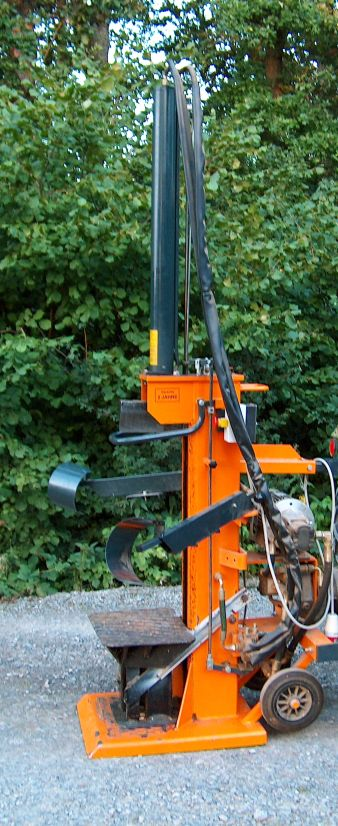 Holzspalter